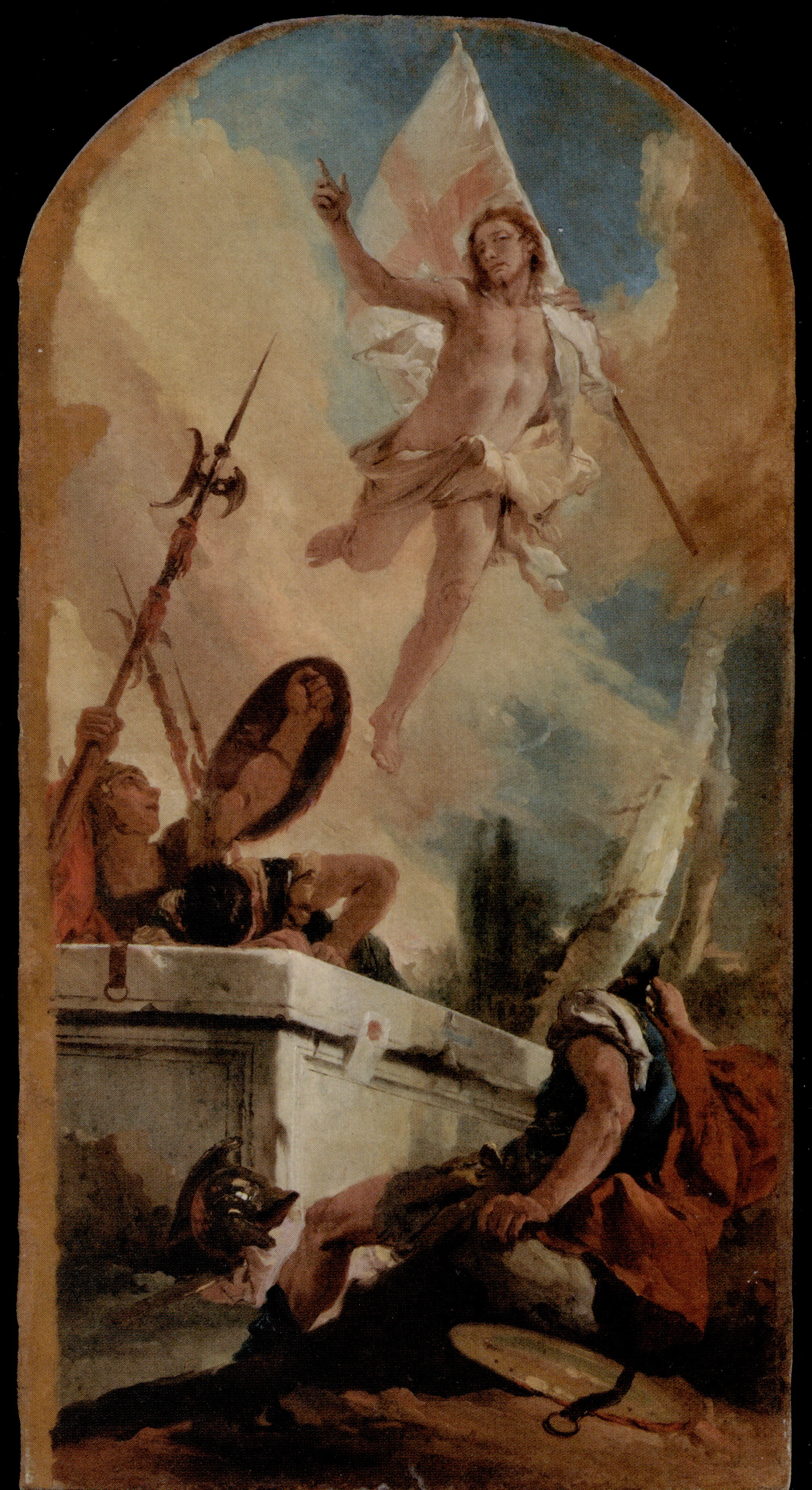 Duomo di Udine - Giovanni Battista Tiepolo - Resurrezione